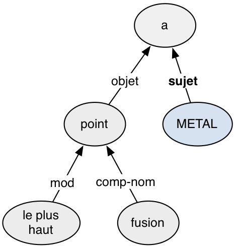 Cet arbre représente la structure syntaxique de la phrase "Quel métal a le plus haut point de fusion ?".